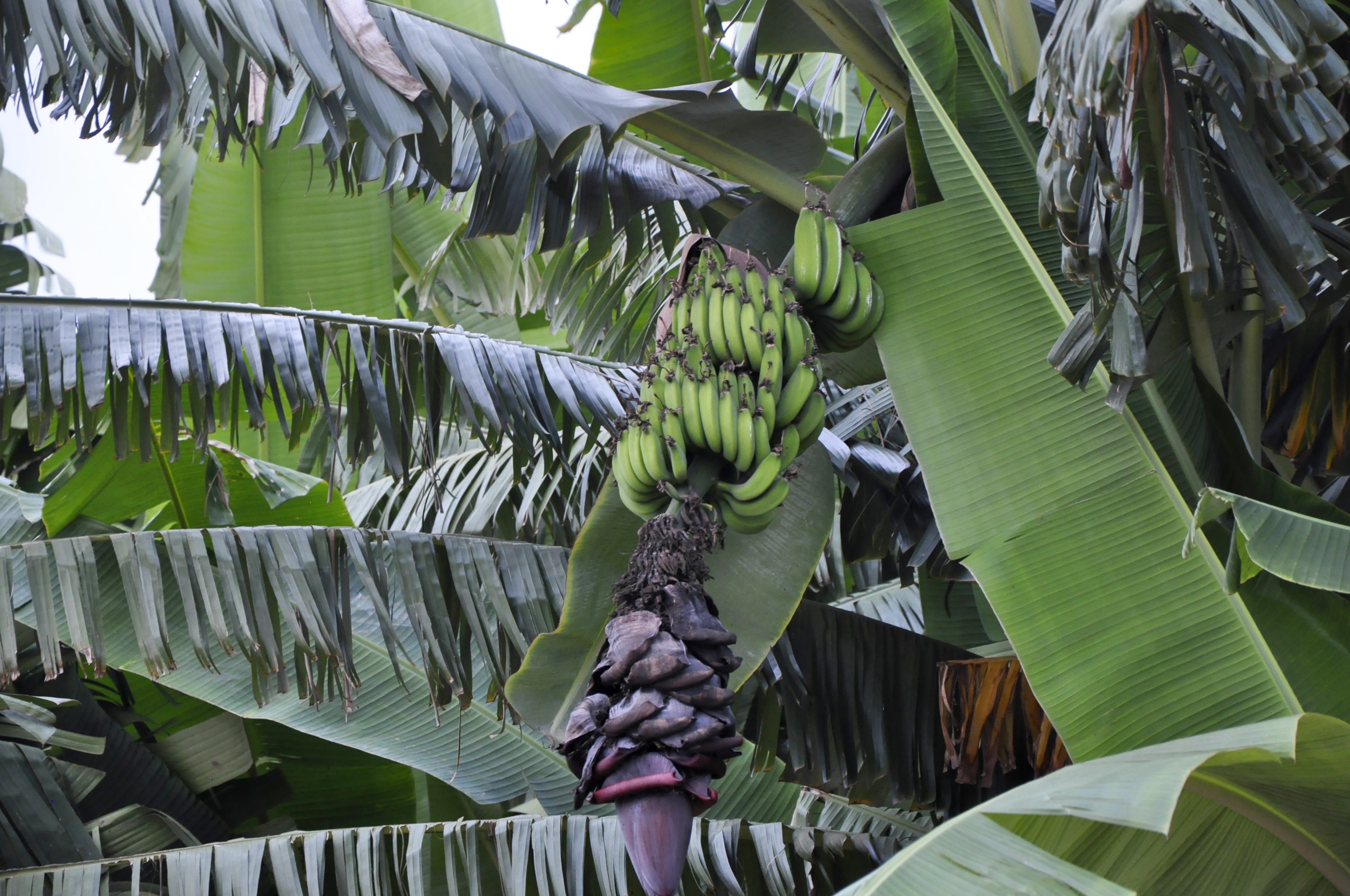 Kinyarwanda: Igitoki